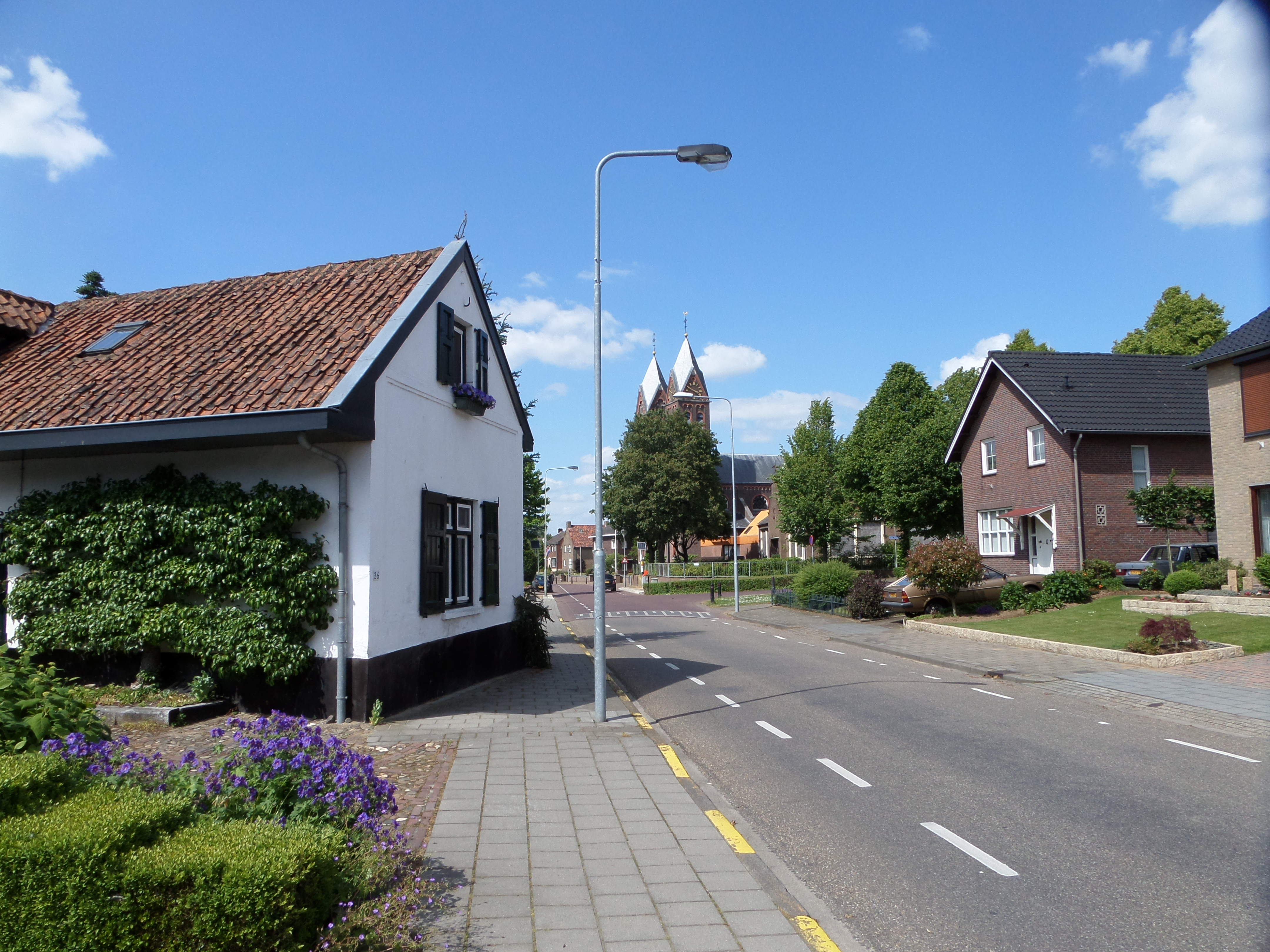 Einighausen (gemeente Sittard-Geleen) in het zuiden van de Nederlandse provincie Limburg